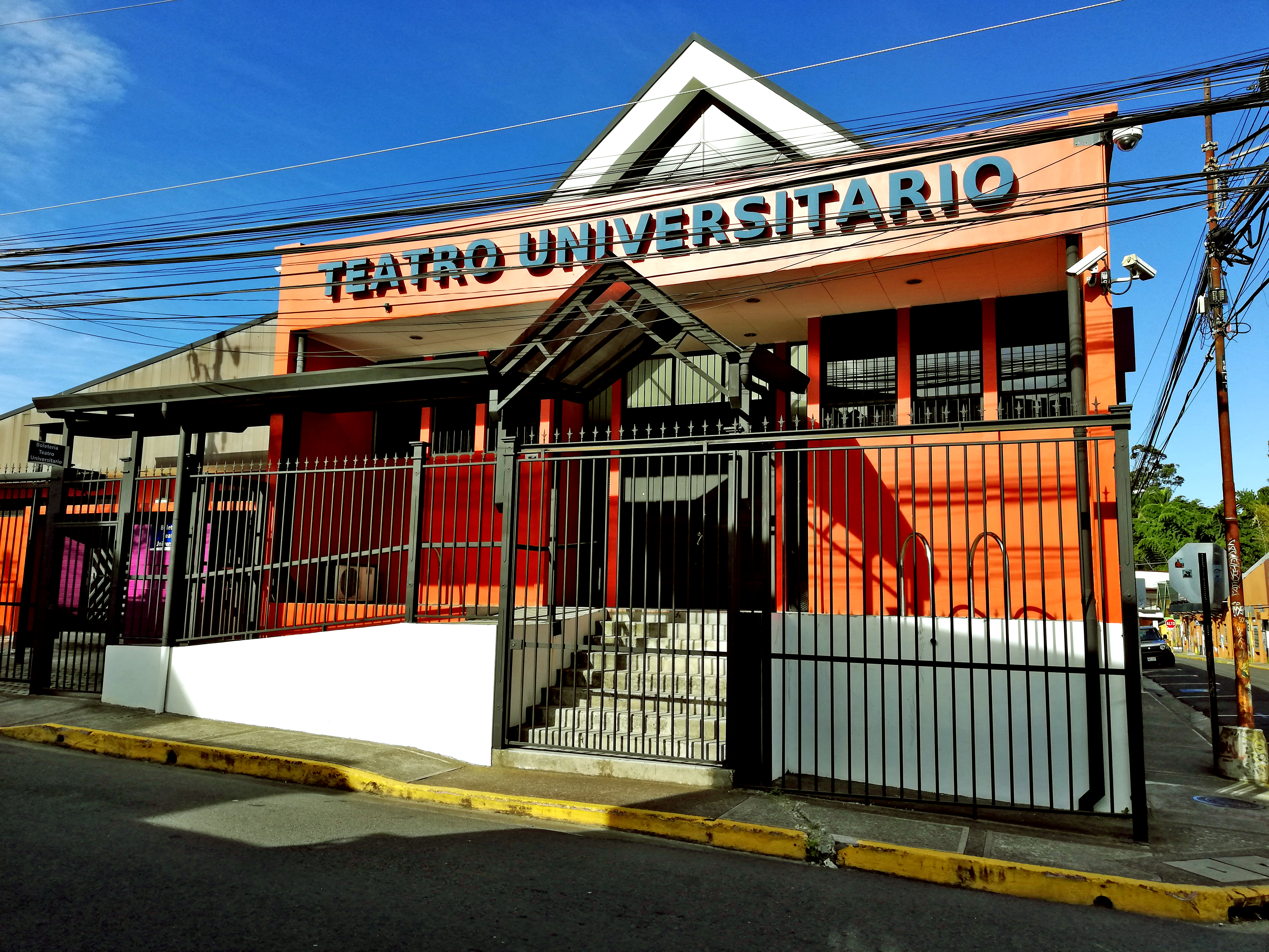 Fachada del edificio del Teatro Universitario de la Universidad de Costa Rica, localizado en San Pedro de Montes de Oca, San José, Costa Rica.